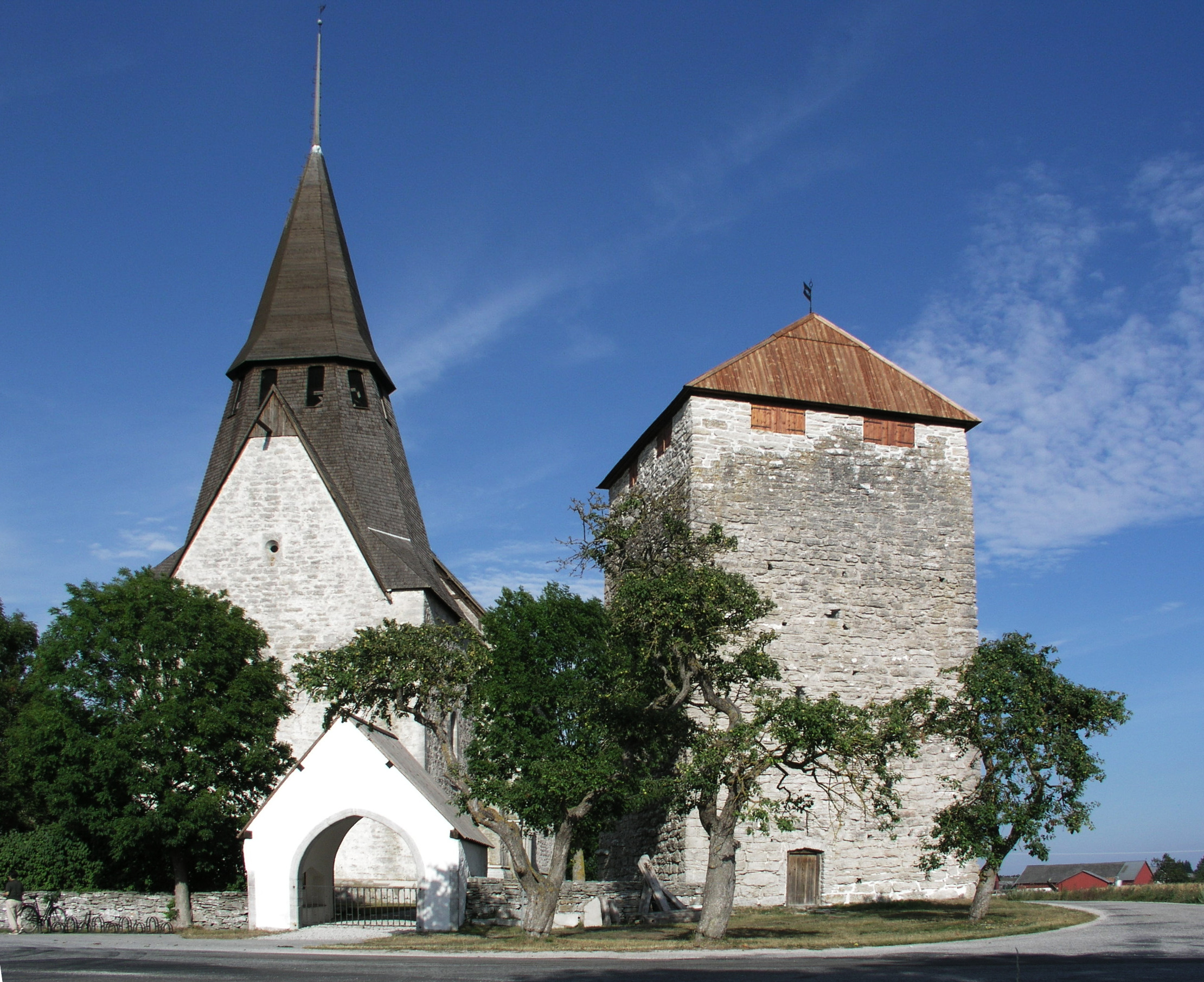 Gammelgarns kyrka, Diocese of Visby, Gotland, Sweden.